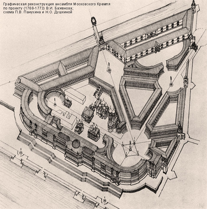 Графическая реконструкция ансамбля Московского Кремля по проекту В.И. Баженова. Схема П.В. Панухин, Н.О. Душкина